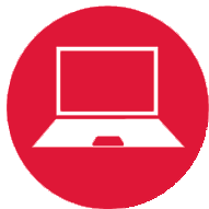 Logotipo Web TeleElx